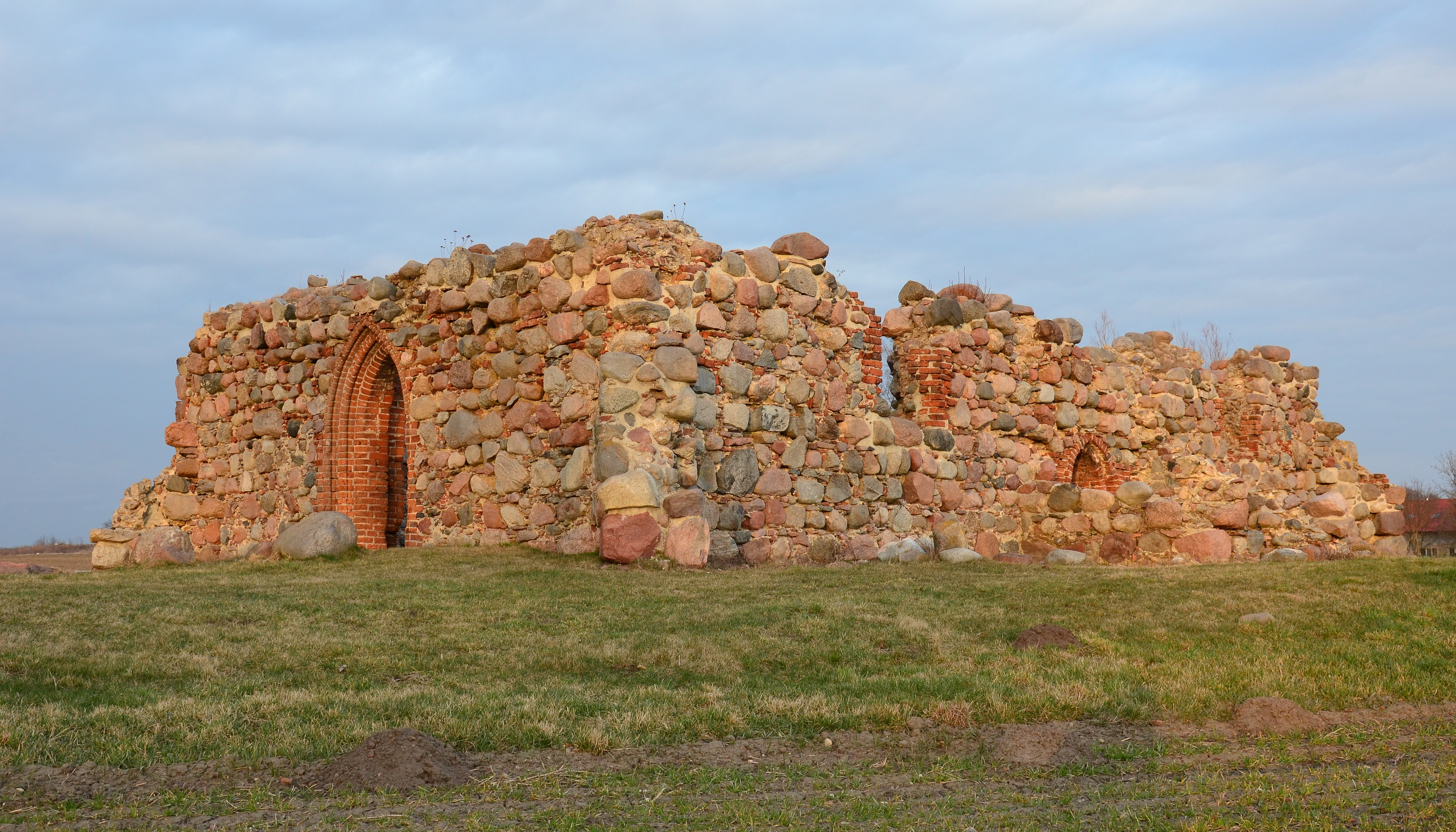 Zajączkowo, ruiny kościoła św. Jana Chrzciciela, ok. 1300